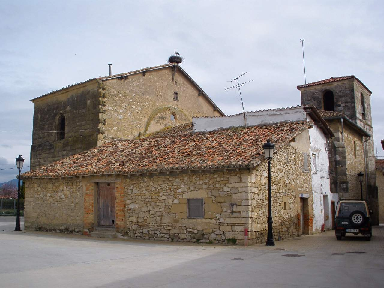 Iglesia de Santa Lucía (Zambrana, Álava)